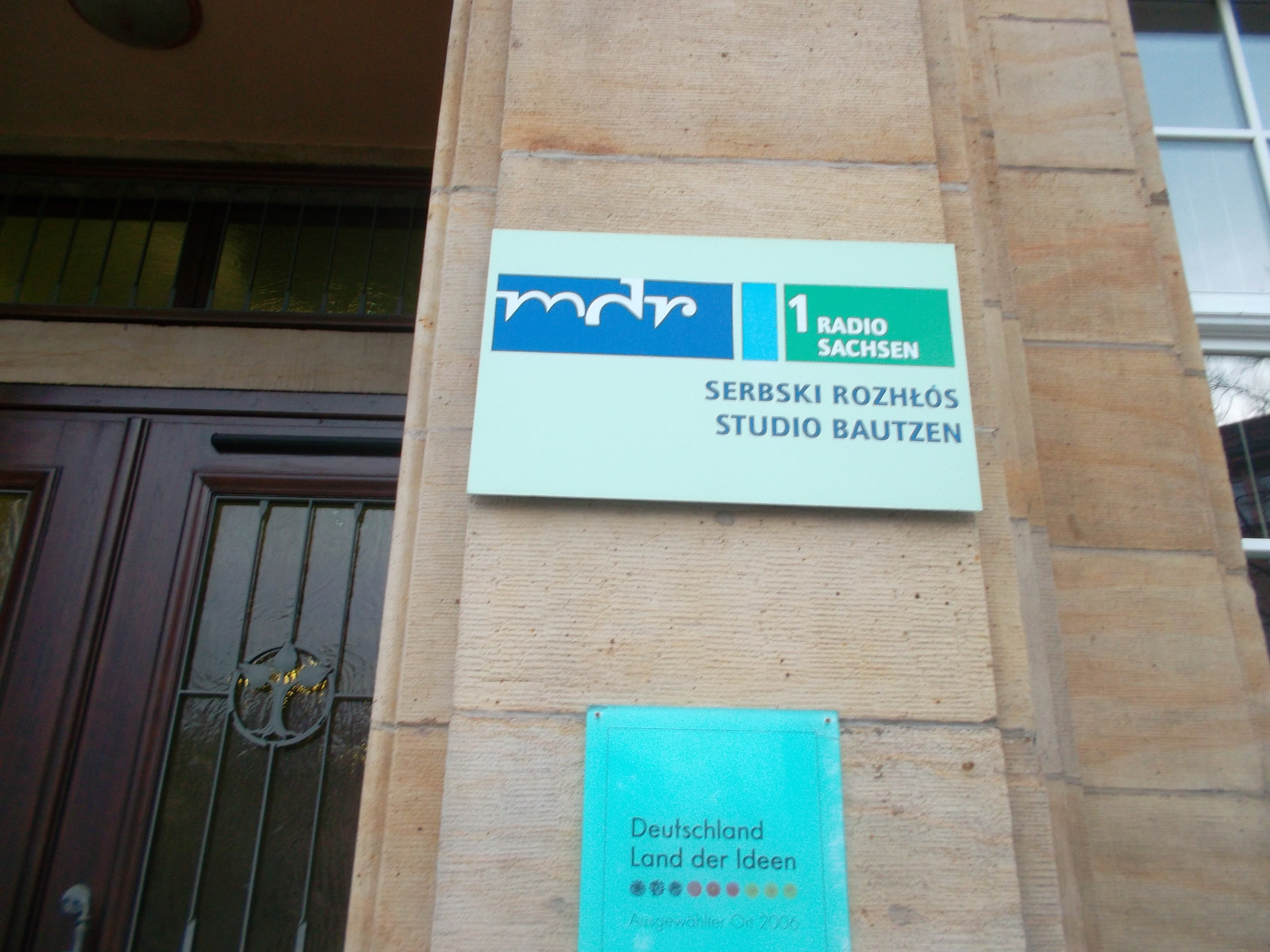 Hinweistafel am Regionalstudio (Bautzen) Mitteldeutscher Rundfunk (MDR) Landesfunkhaus Sachsen